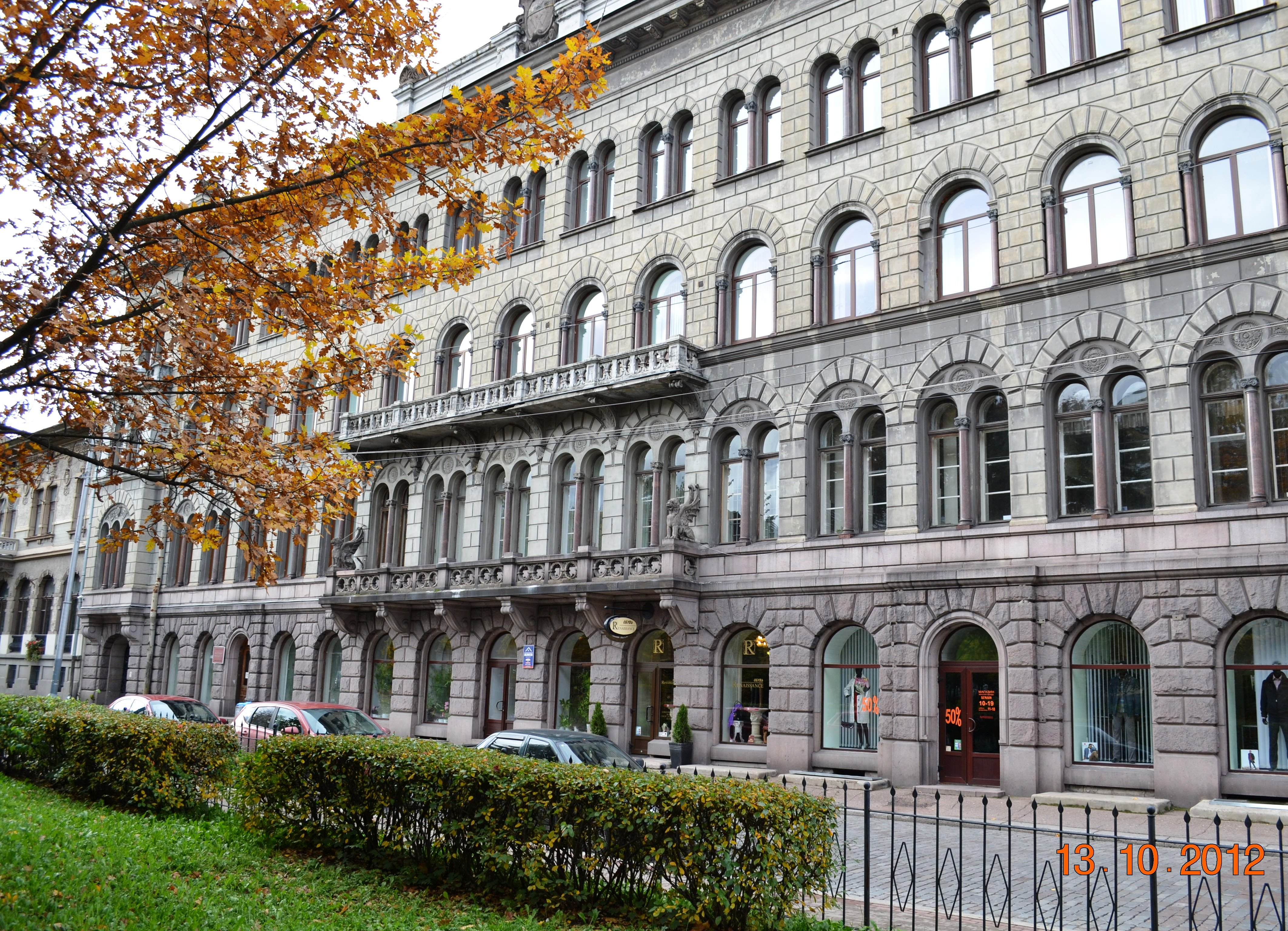 Здание объединенного банка северных стран (Санкт-Петербург и Лен.область, Выборг, пионерская улица, 4)